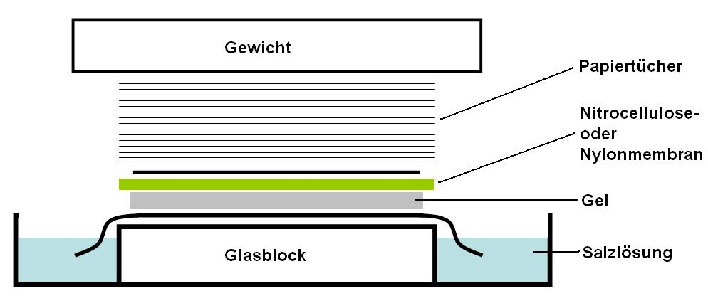 Southernblot Aufbau